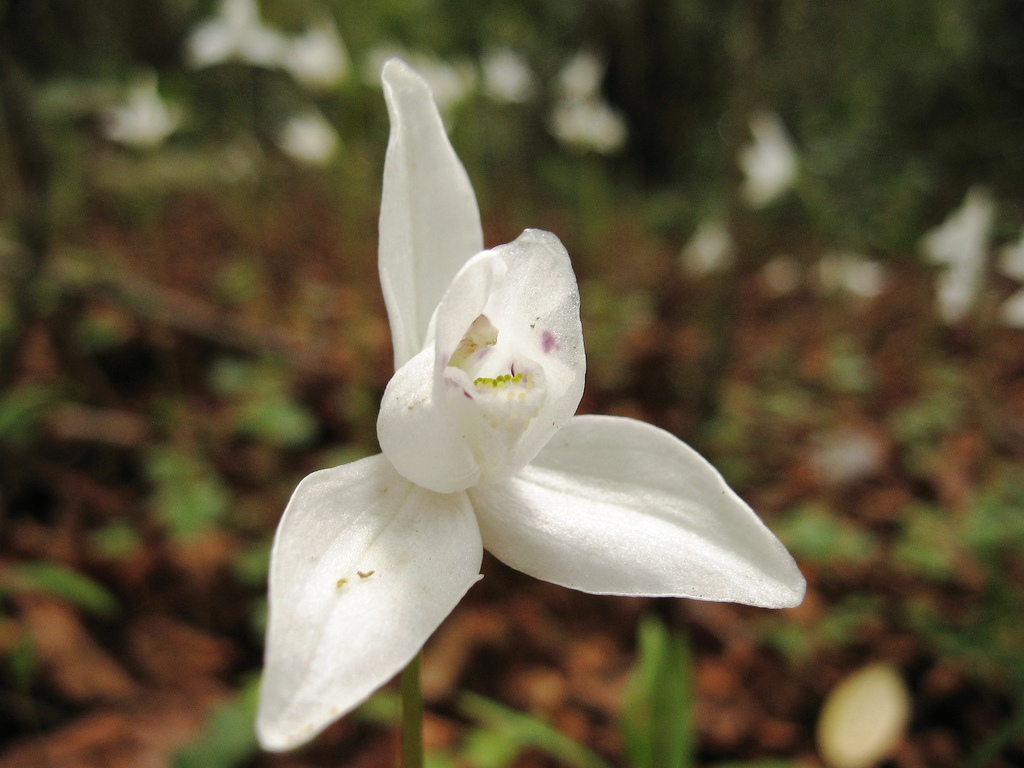 Flor de palomita (Codonorchis lessonii).